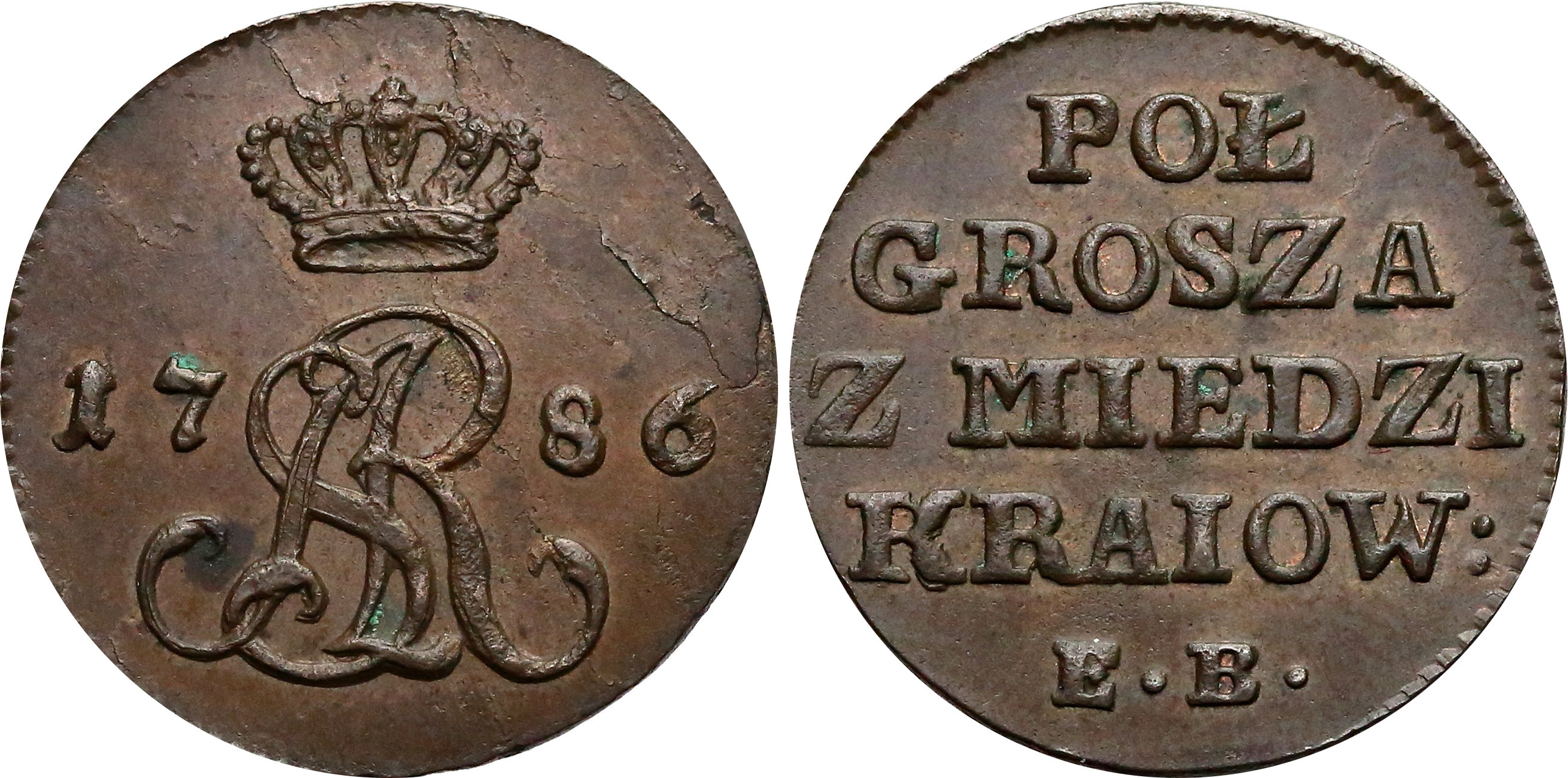 Próba półgrosz 1786 Z MIEDZI KRAIOWEY